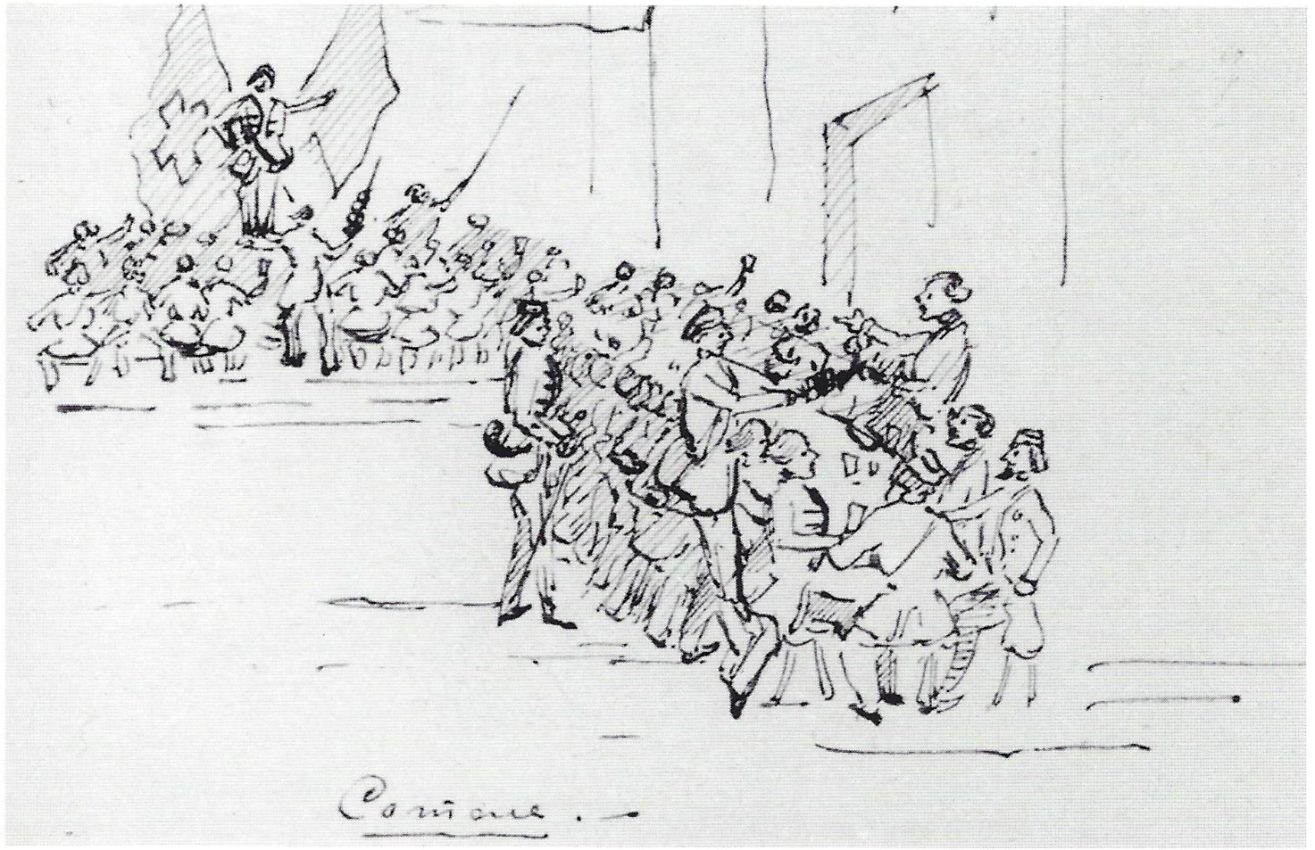 Feierlicher Landesvater in Lausanne (1849).